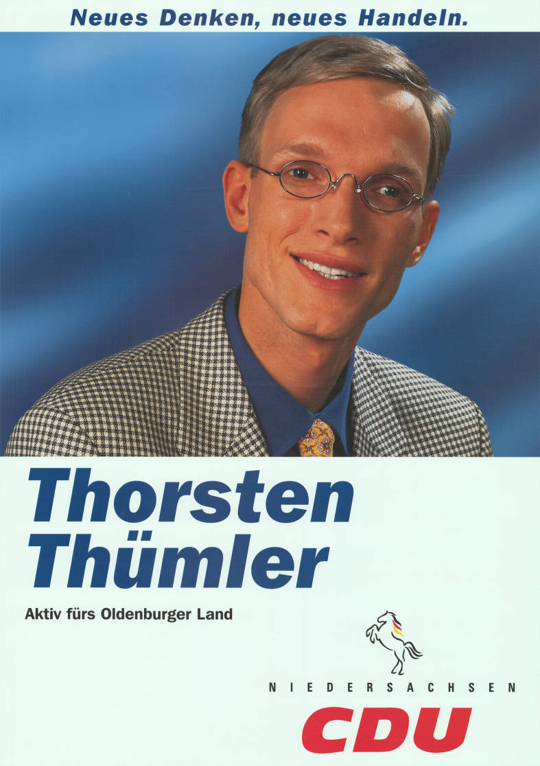 Neues Denken, neues Handeln. Thorsten Thümler Aktiv fürs Oldenburger Land Niedersachsen CDUAbbildung:Porträtfoto - Niedersachsenross mit NationalfarbenPlakatart:Kandidaten-/Personenplakat mit PorträtAuftraggeber:CDU NiedersachsenObjekt-Signatur:10-008 : 1117Bestand:Landtagswahlplakate Niedersachsen (10-008)GliederungBestand10-18:Landtagswahlplakate Niedersachsen (10-008) » CDULizenz:KAS/ACDP 10-008 : 1117 CC-BY-SA 3.0 DE